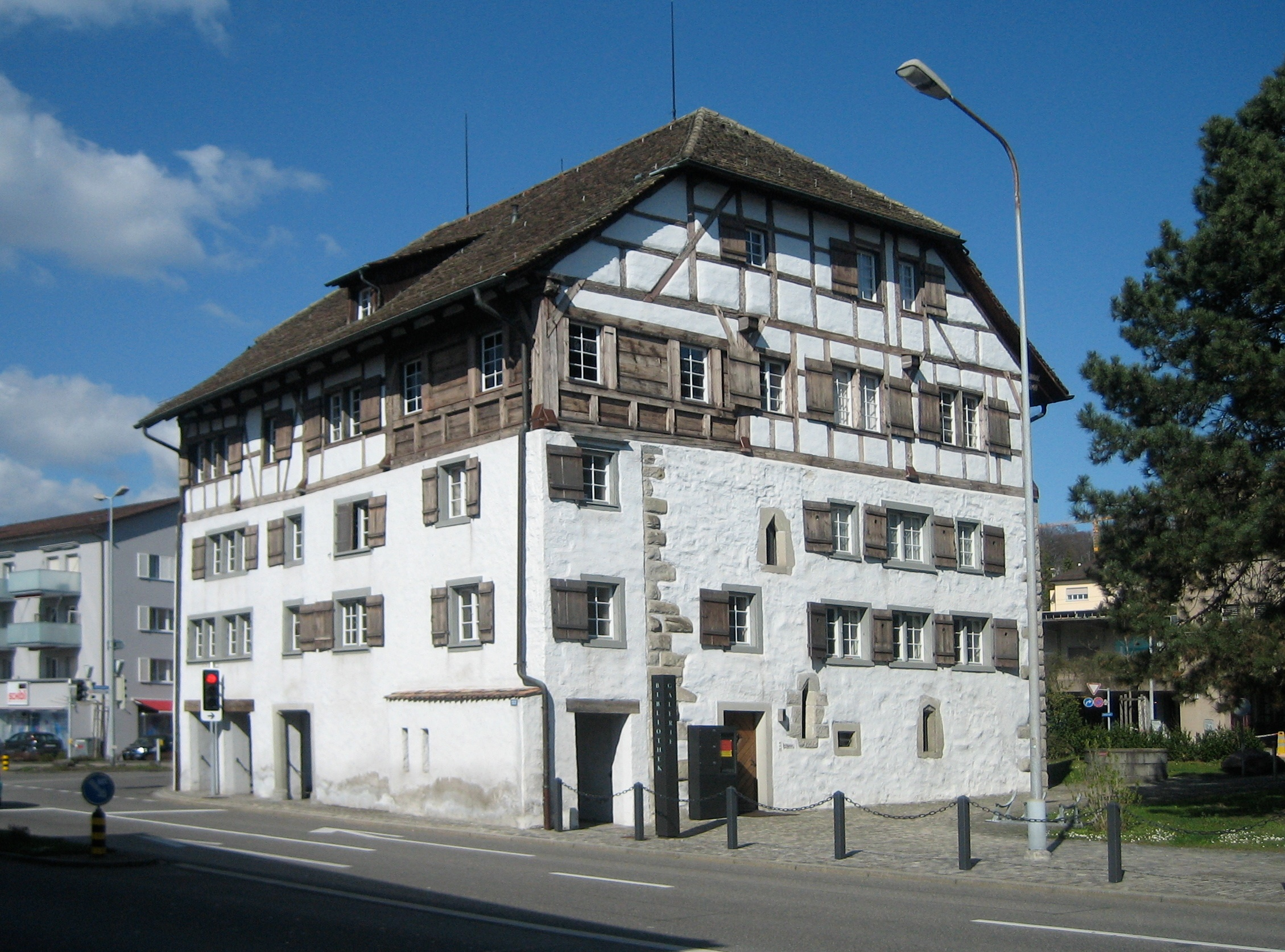 Das 'Höchhus' in Küsnacht aus dem 13. Jahrhundert